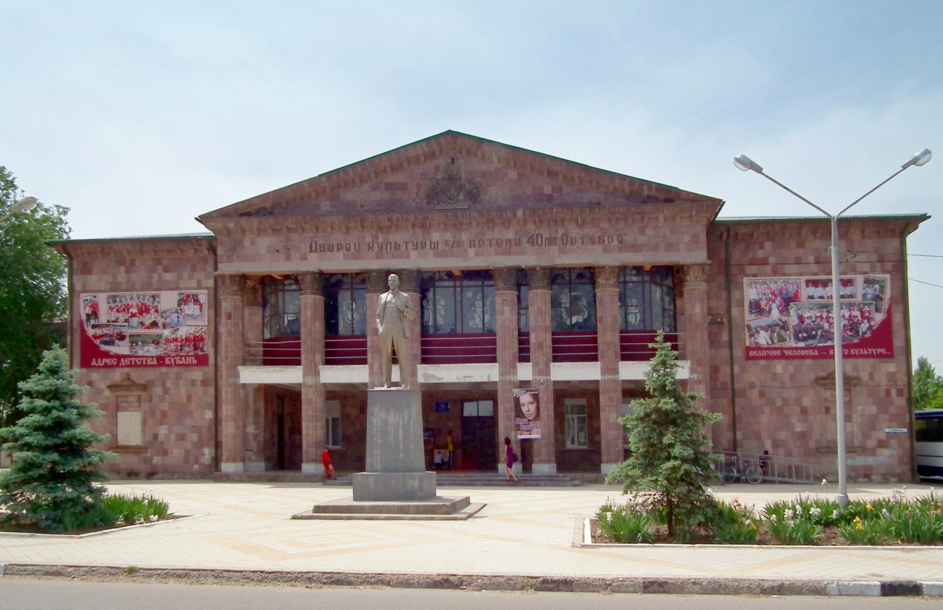 Дворец Культуры станицы Динская